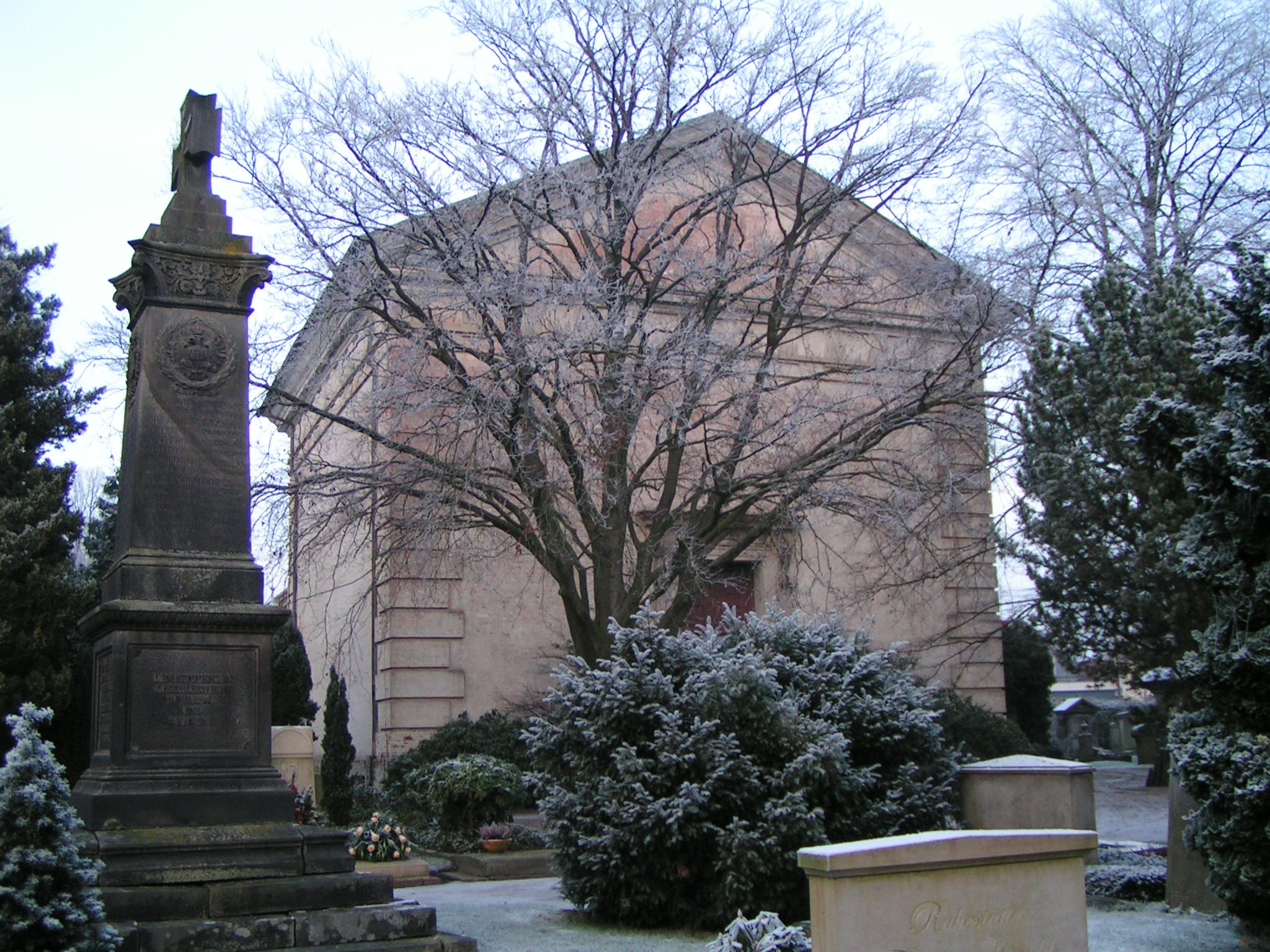 Mausoleum der Großherzoge von Oldenburg auf dem Gertrudenkirchhof in Oldenburg. Links das Denkmal für die in Oldenburg verstorbenen deutschen Soldaten des deutsch-französischen Krieges 1870-71